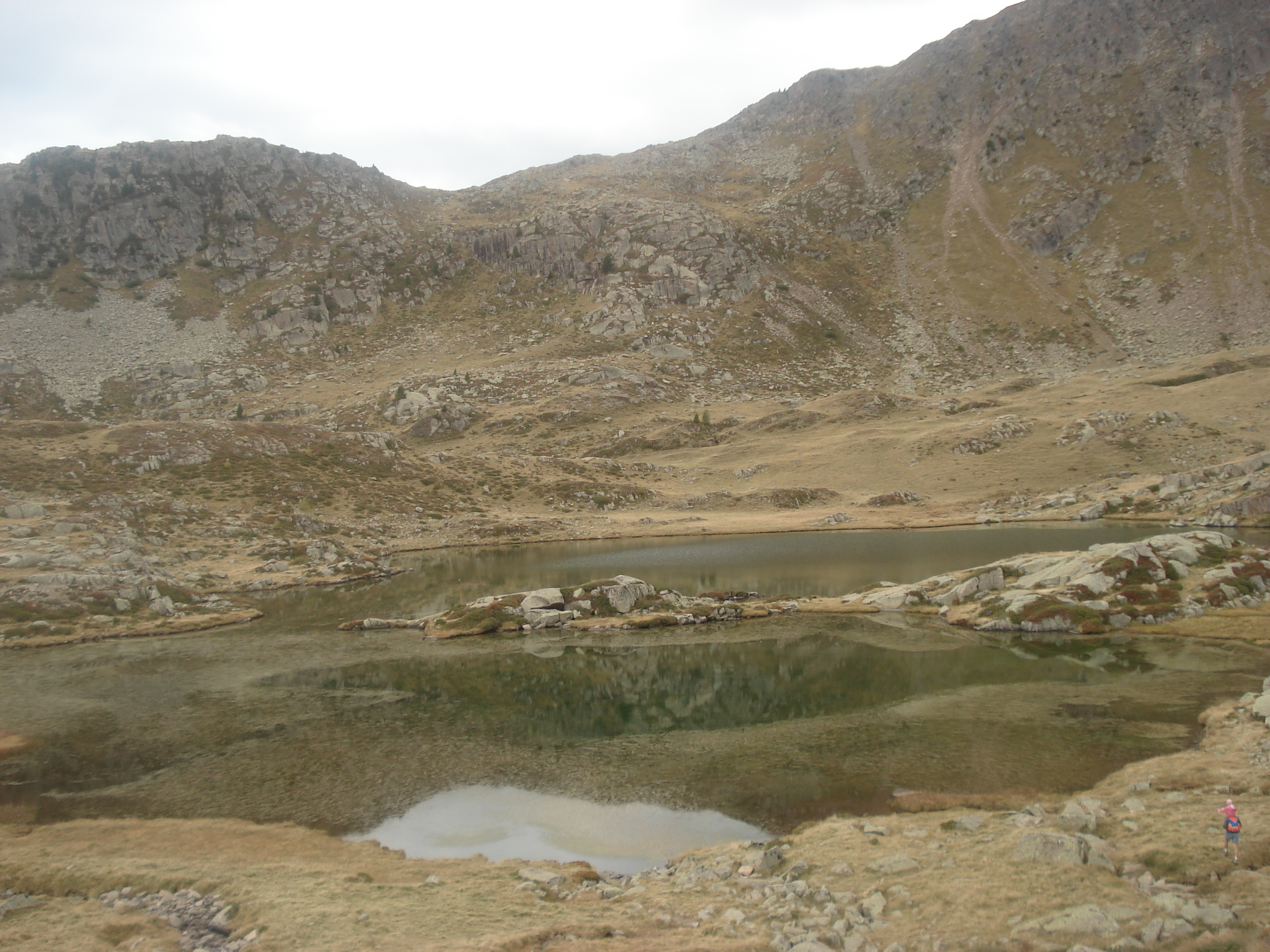 lago di juribruto